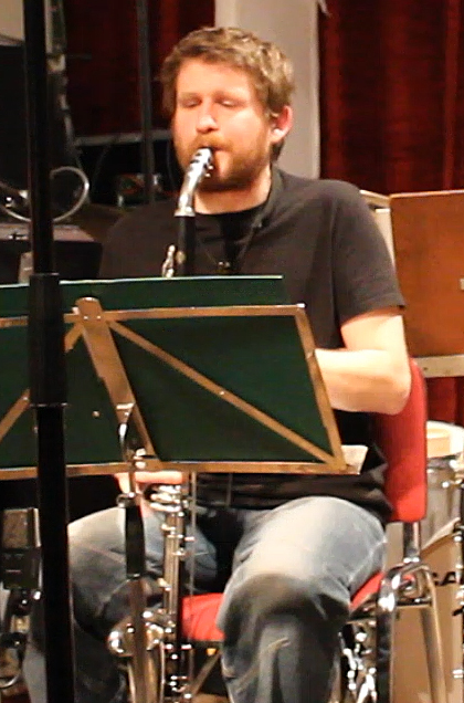 Joris Rühl auf dem SWR NEW Jazz Meeting im Kölner Loft: „hübsch acht“, mit Carl Ludwig Hübsch - tuba, compositions, Isabelle Duthoit – clarinet, Joris Rühl – clarinet, Matthias Schubert – tenorsax, Wolter Wierbos – trombone, Philip Zoubek – piano, Joker Nies – electronics und Christian Lillinger - drums